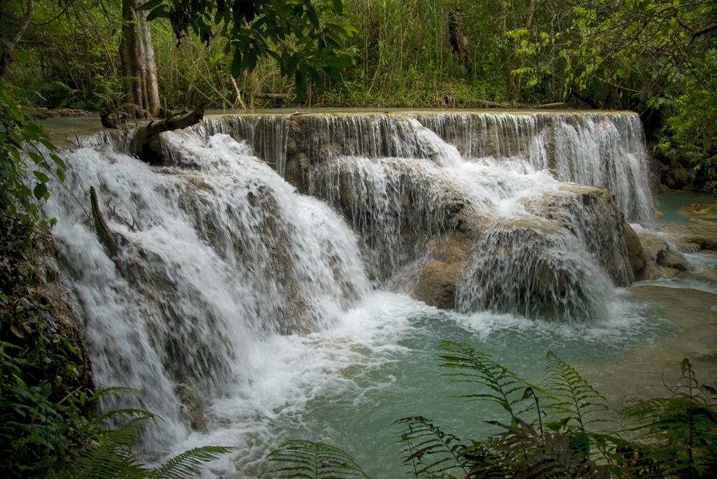 Третий каскад водопада Тат Куанг Си (Third Cascade of Kuang Si Falls)